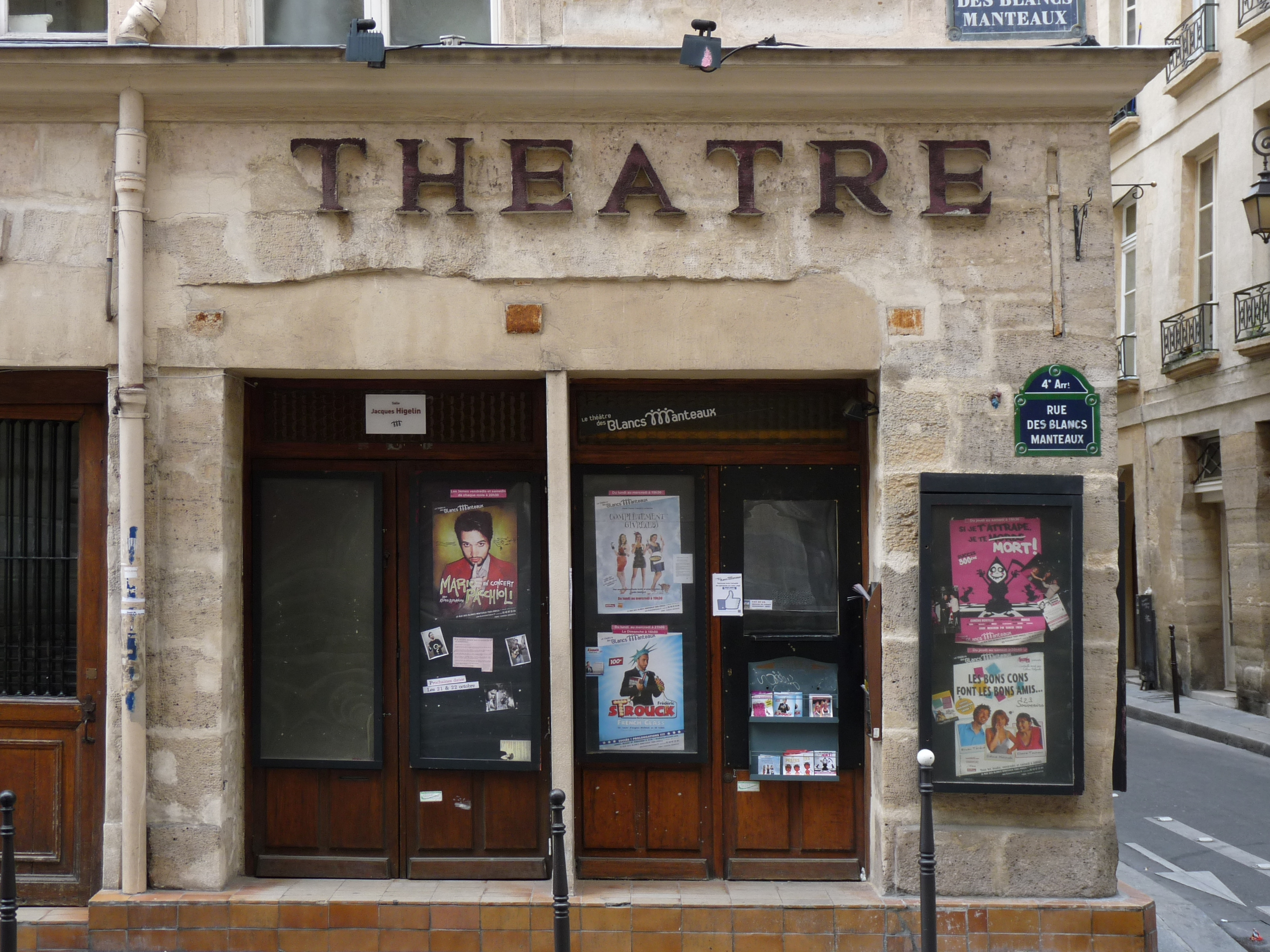 Le théatre des Blancs Manteaux à Paris, façade sur la rue des Blancs Manteaux